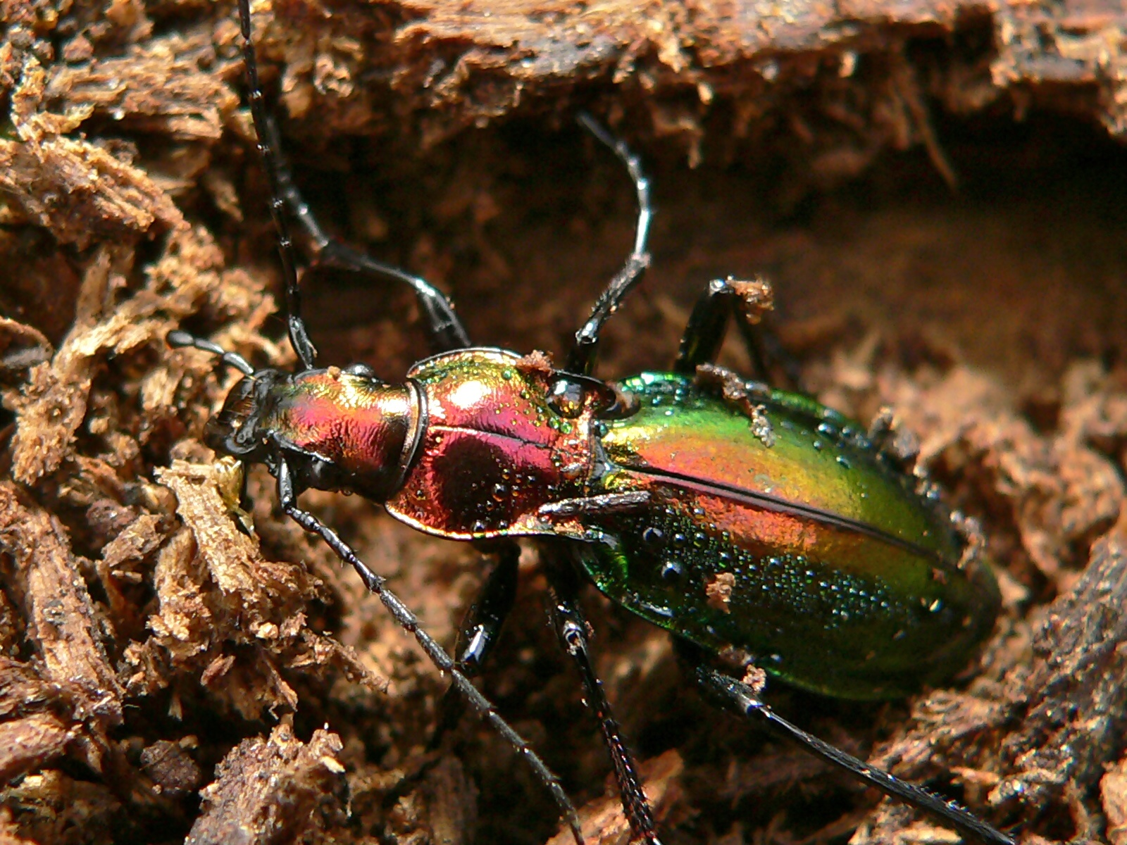 Rennes-les Bains, Aude, FRANCE